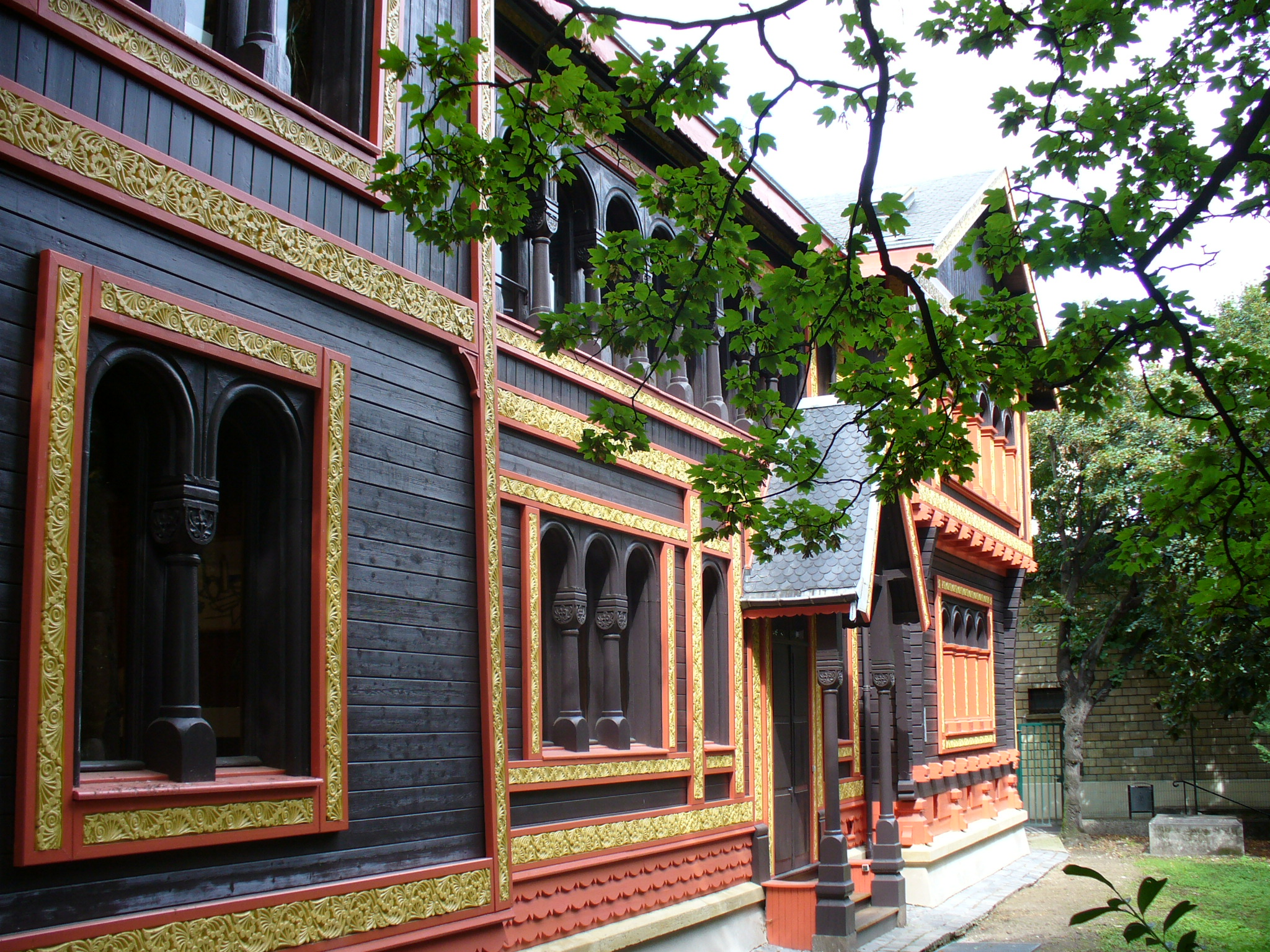 Musée Roybet-Fould à Courbevoie (Hauts-de-Seine). Façade arrière.